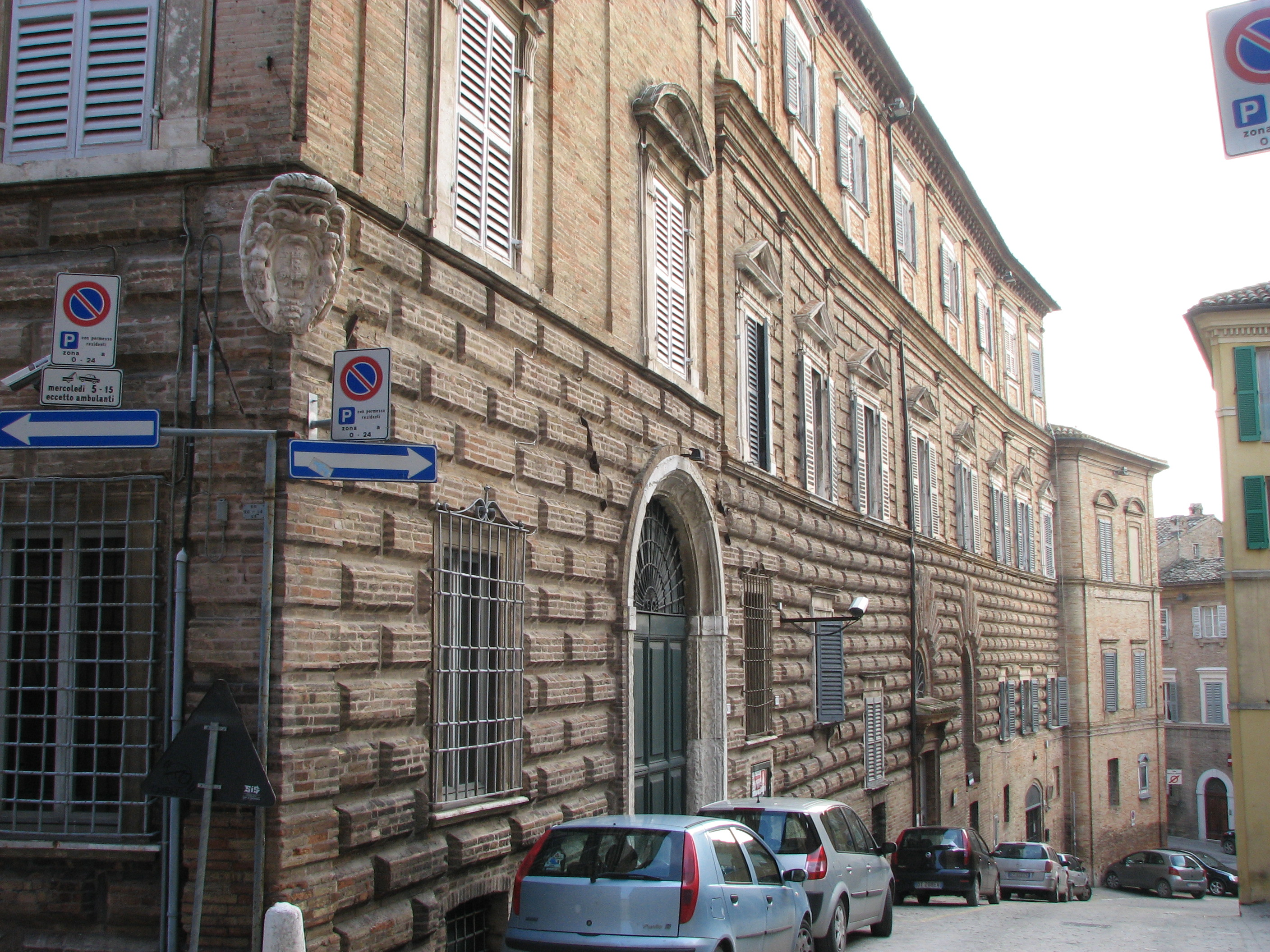 Via 20 Settembre, Macerata, Italy, 2010